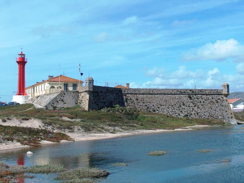 Forte de Esposende. Forte de Esposende, junto à foz do rio Cávado, Portugal.